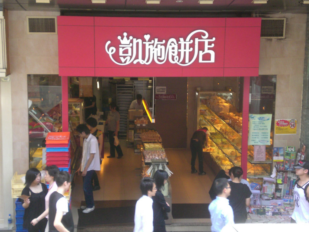 zh-yue:凱施餅店 莊士敦道